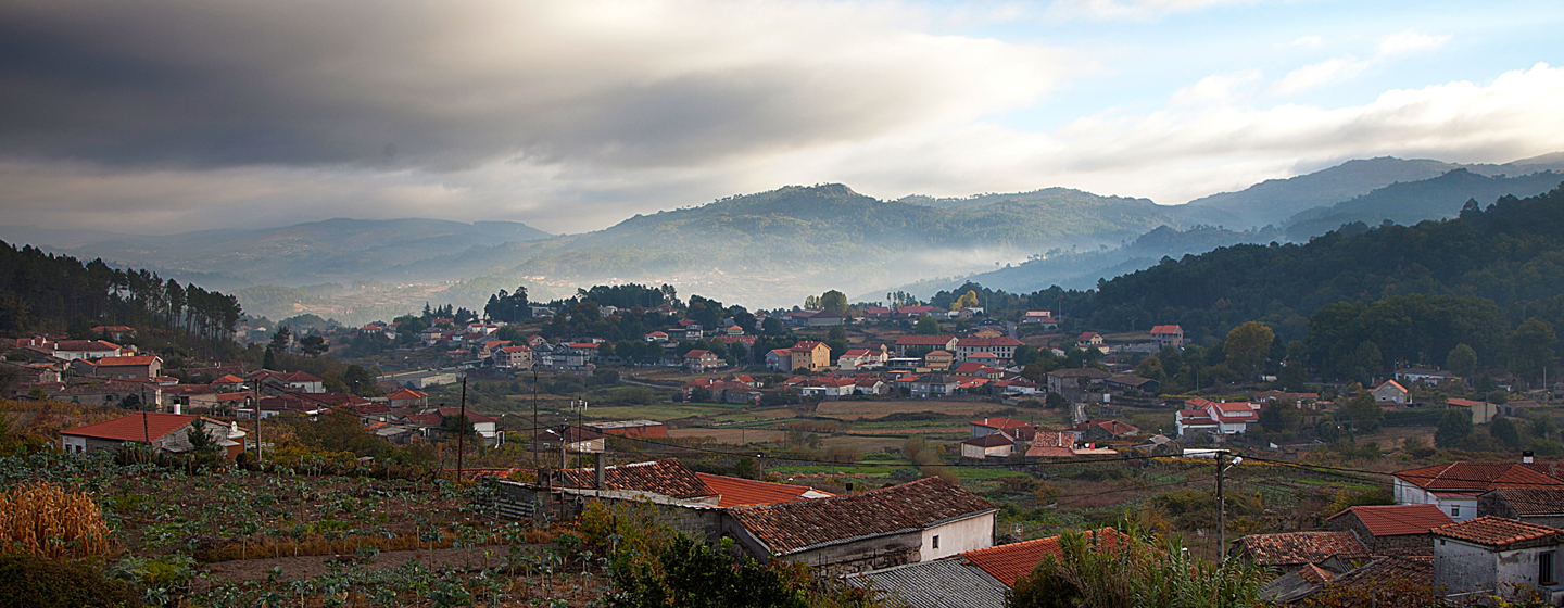 Vista da capitalidadde municipal